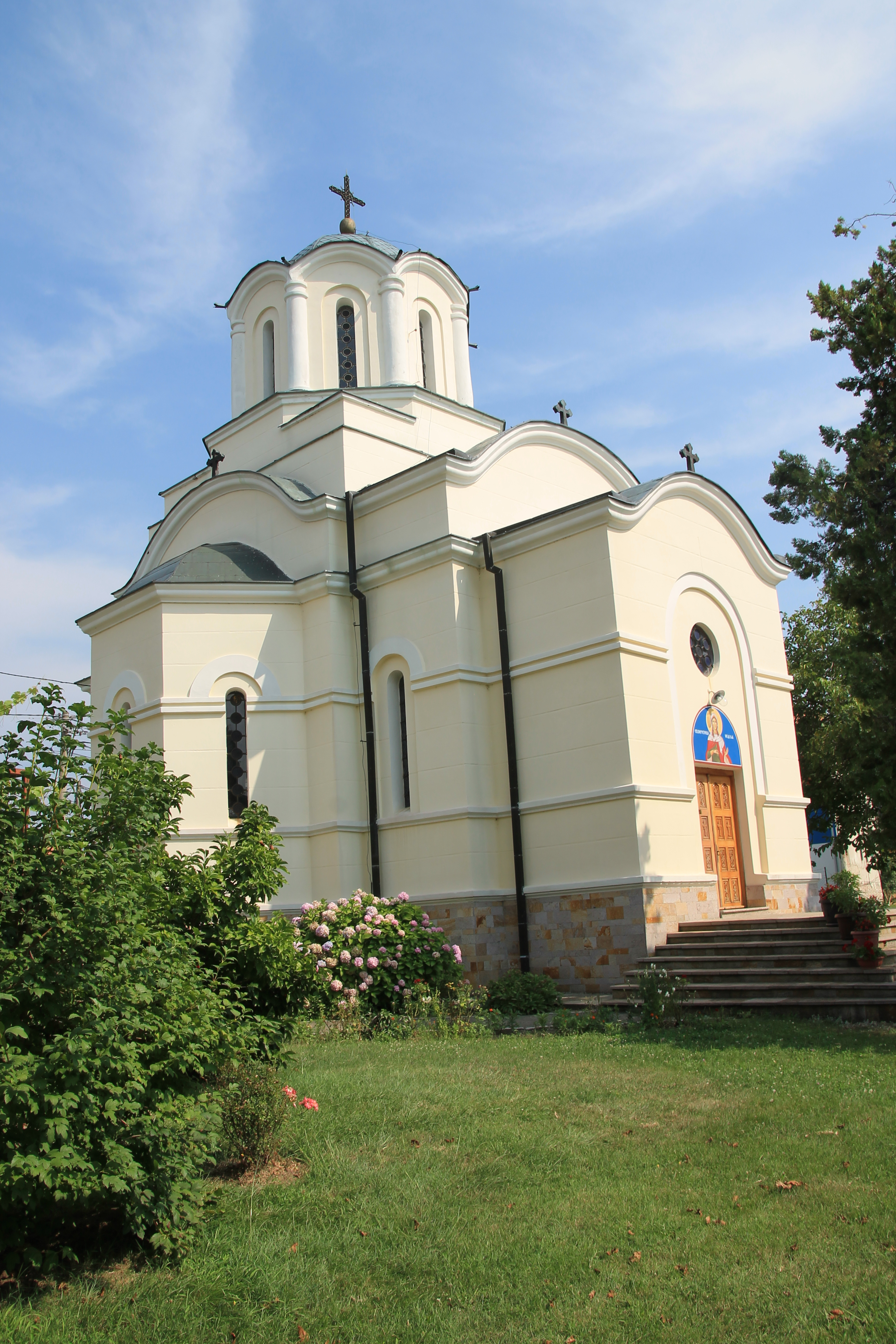 Crkva Sv. Nedelje (Desimirovac)